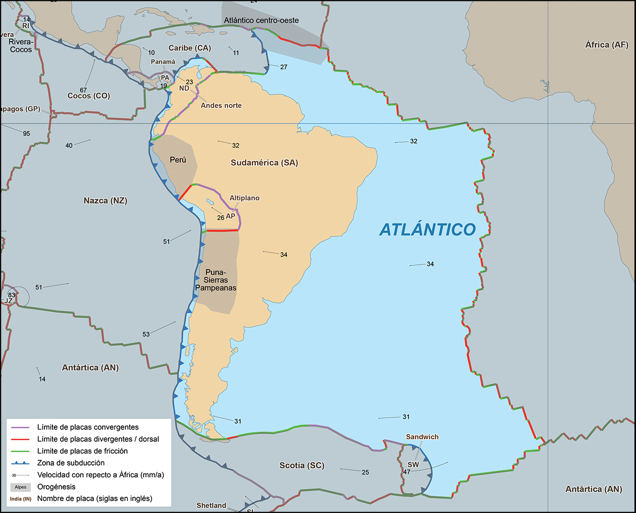 Placa tectónica de Sudamérica